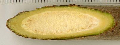 Elder Sambucus nigra pith, Mark eines Holunderstängels.